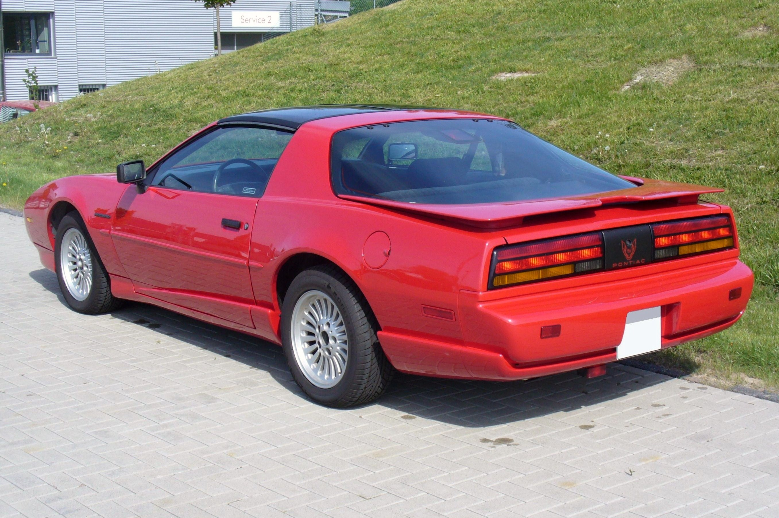 Pontiac Firebird